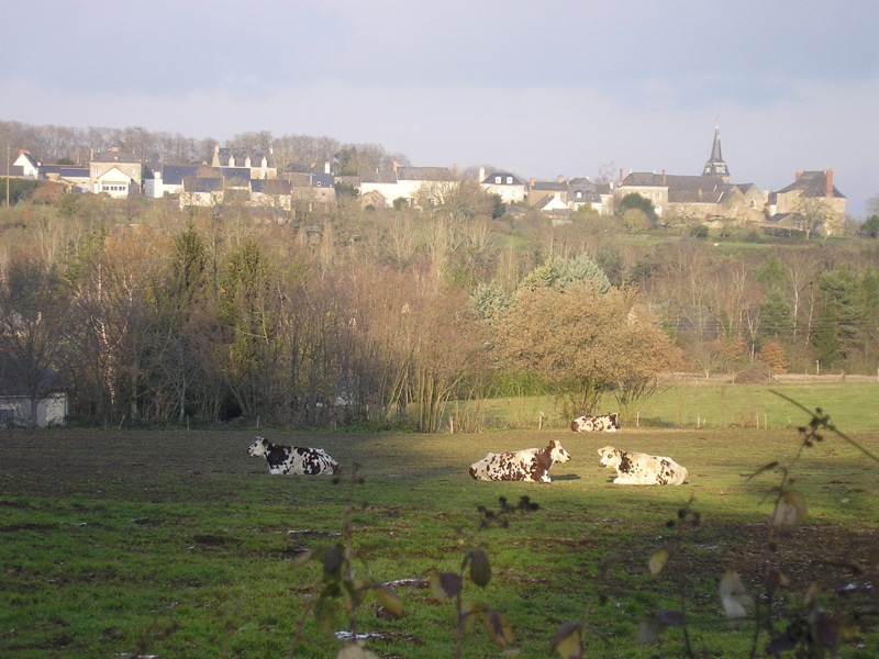 La Jaille Yvon, vue de la Vallée